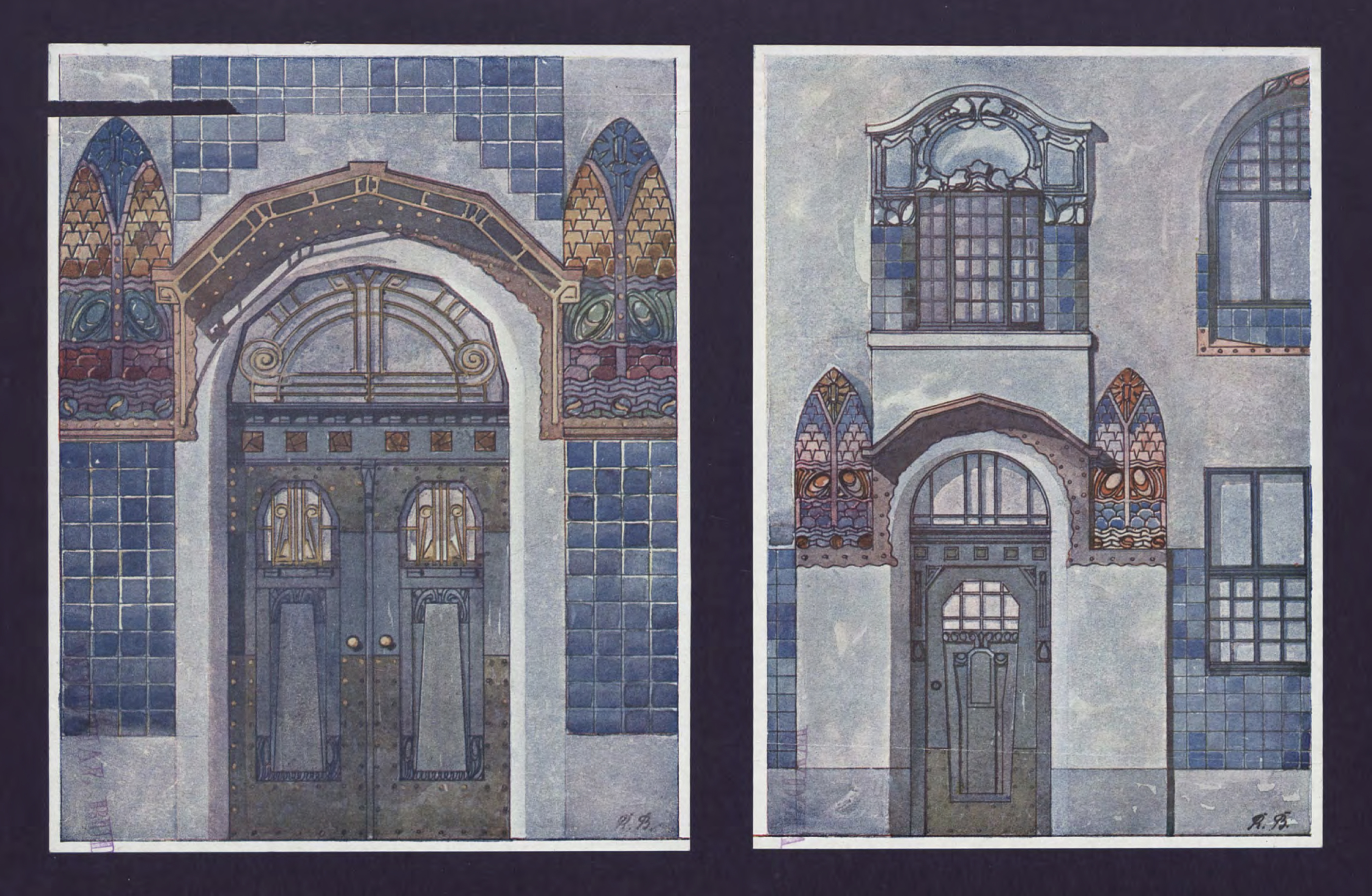 Der moderne Ausbau, Tafel 20, Hauseingänge, Architekt Richard Bauer, 1905